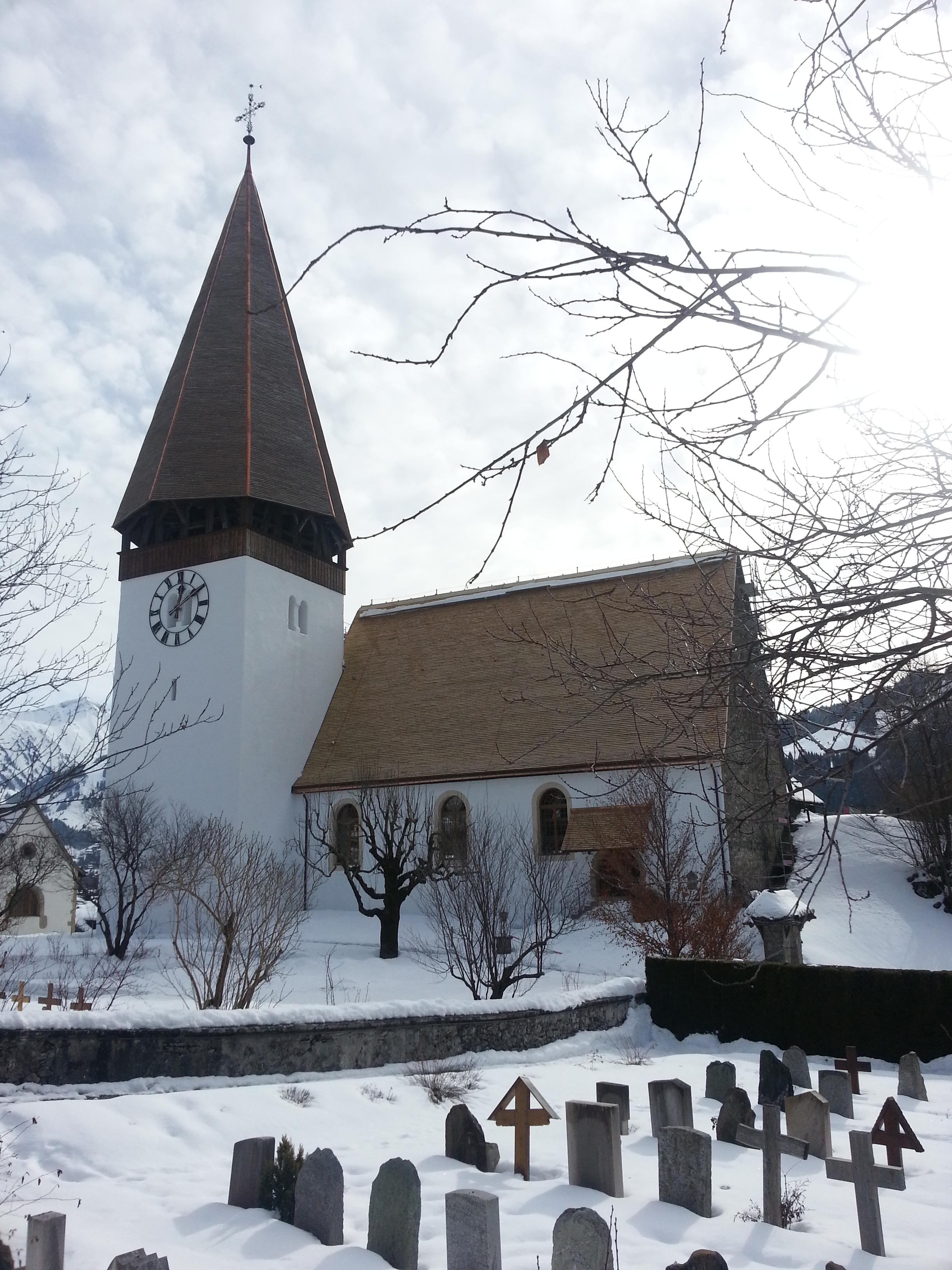 Iglesia de Saanen con nieve